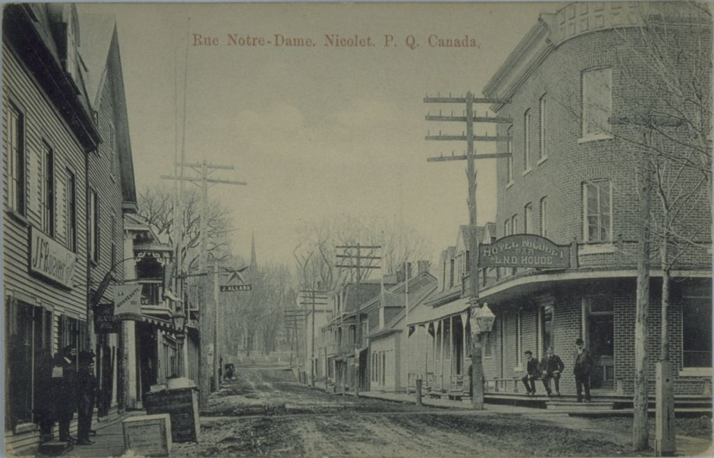 Rue Notre-Dame, Nicolet, carte postale, Joseph-Donat Richard, éditeur